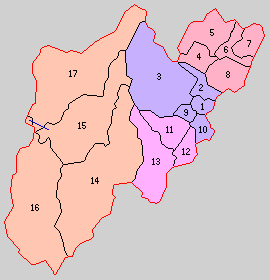 山形県西置賜郡の町村。